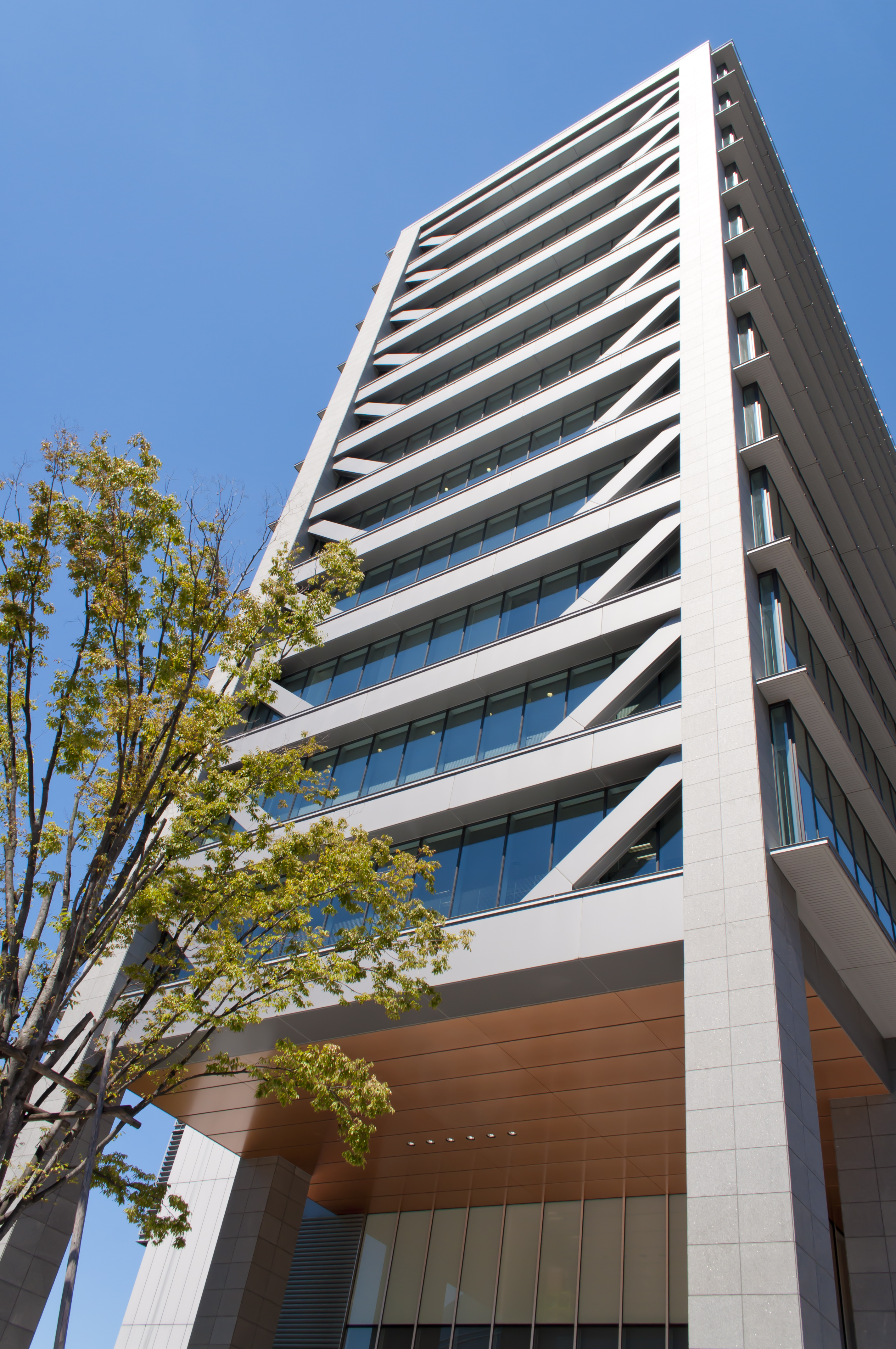 薬院ビジネスガーデン